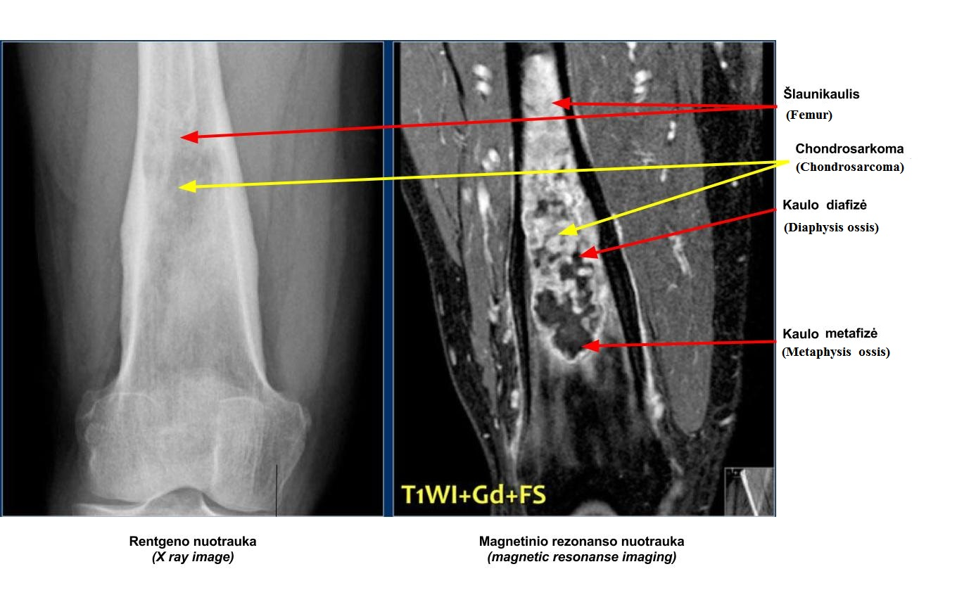 Chondrosarkomos, esančios paciento šlaunikaulyje, vaizdas.